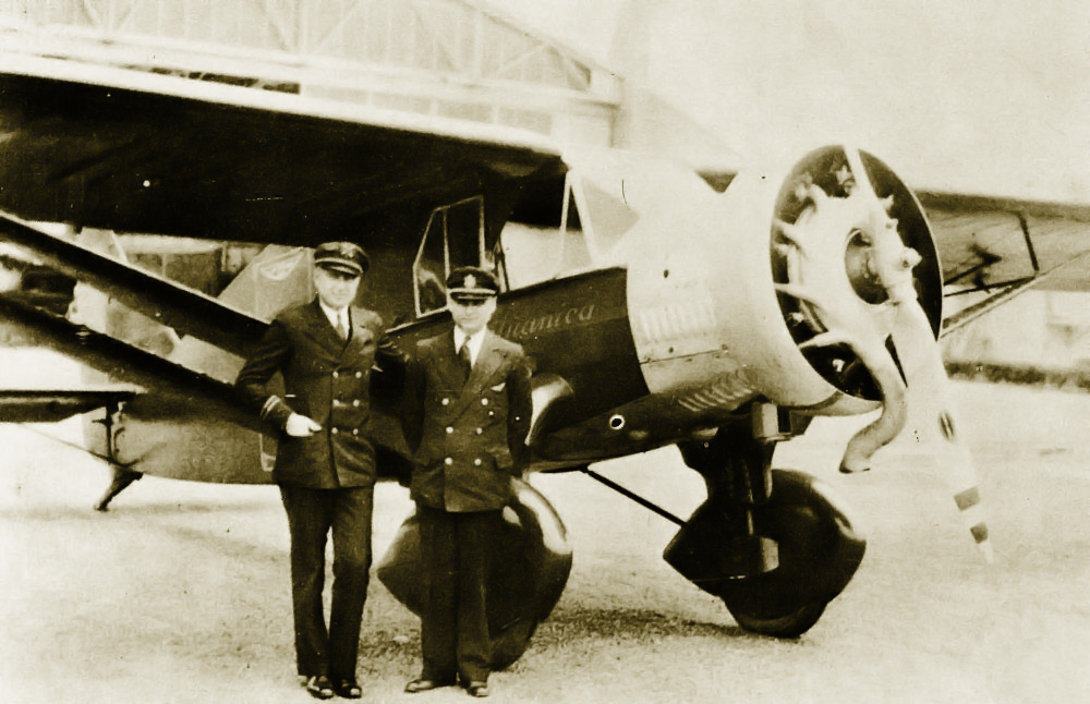 Литуаника и её пилоты перед полётом